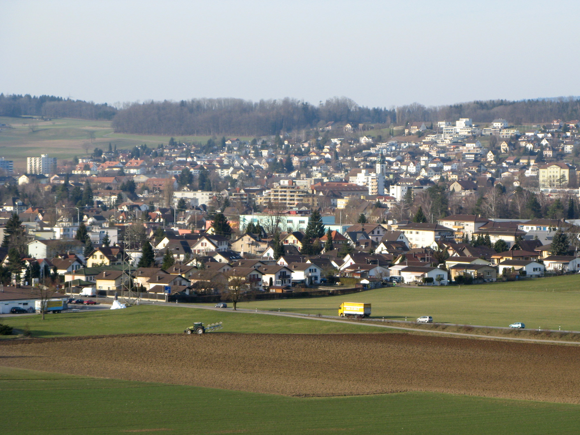 Wohlen von Süden her gesehen, aufgenommen in Büttikon